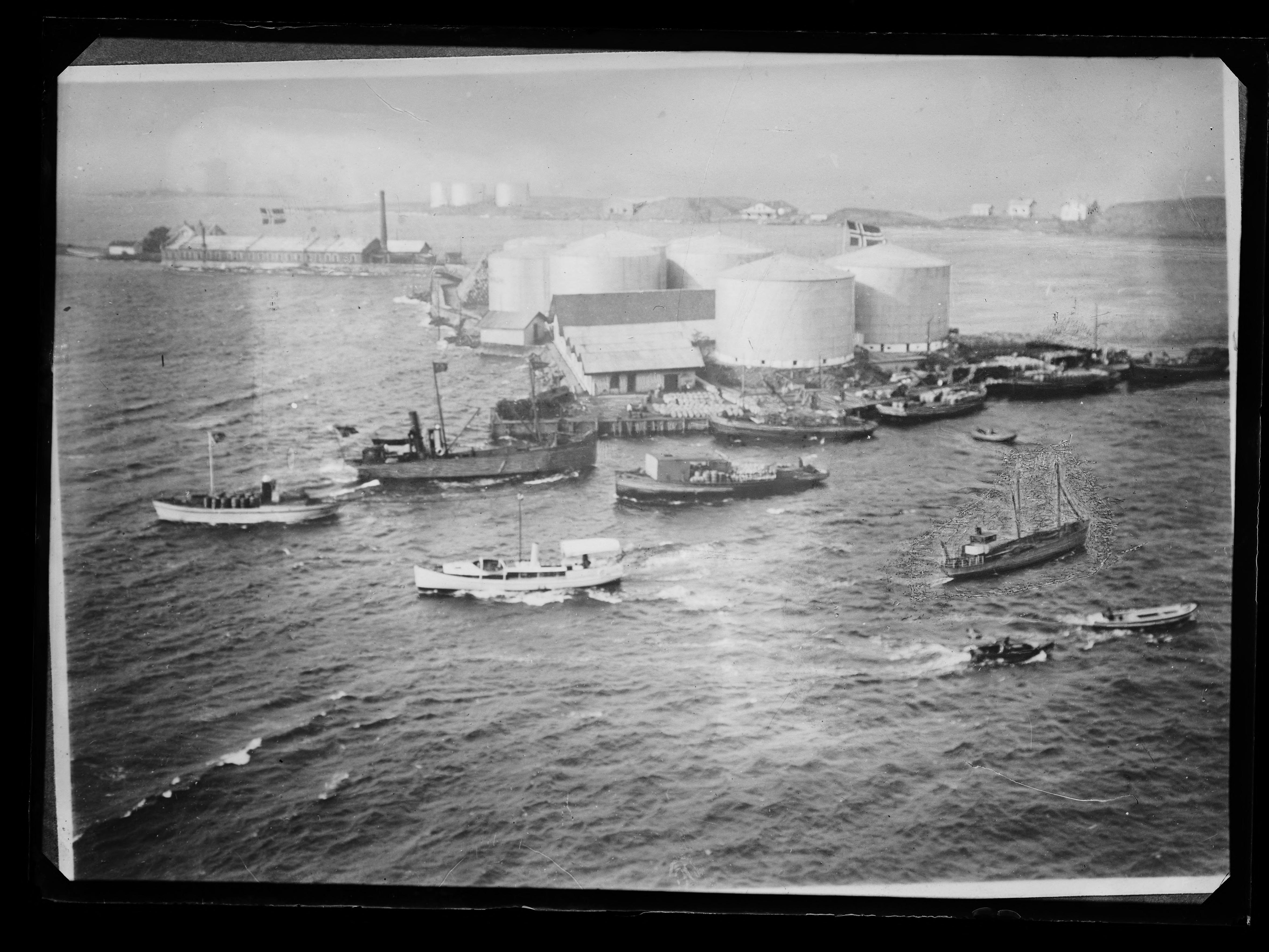 Bildet er hentet fra Nasjonalbibliotekets bildesamling. Anmerkninger til bildet var: Påskrift eske: Østlandske 1917 Oslo, Oslo